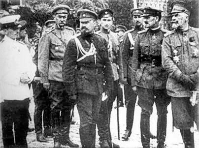 Члены военного министерства Украинской Державы. Крайний слева - Николай Лаврентьевич Максимов, и.о. морского министра, крайний справа - военный министр Александр Францевич Рагоза. Все - в украинских формах. Максимов - в нововведенной униформе УДФ.